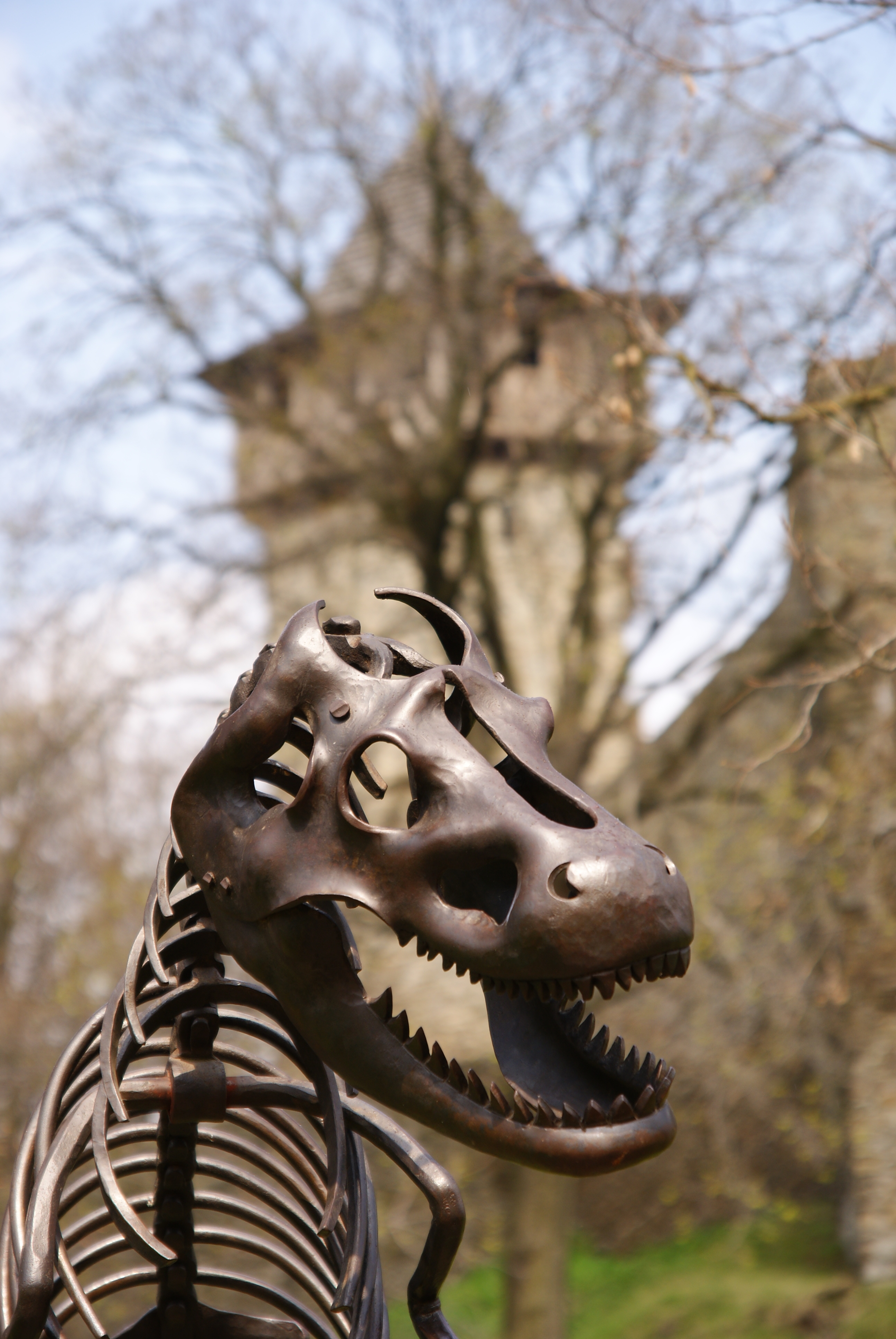 Hrad Helfštýn, zřícenina (Týn nad Bečvou), Týn nad Bečvou